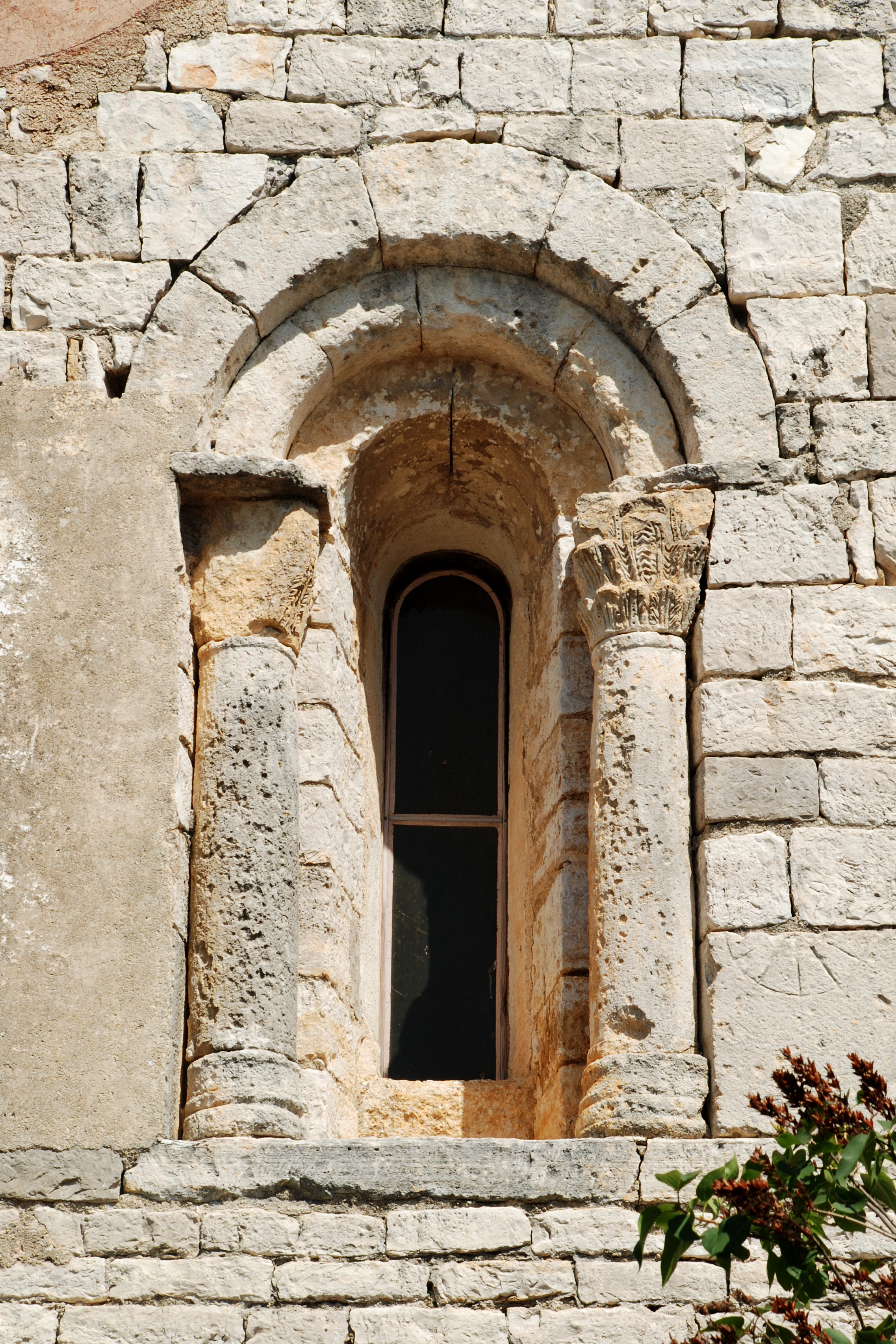 France - Hérault - Église Saint-Nazaire-et-Saint-Celse de Buzignargues